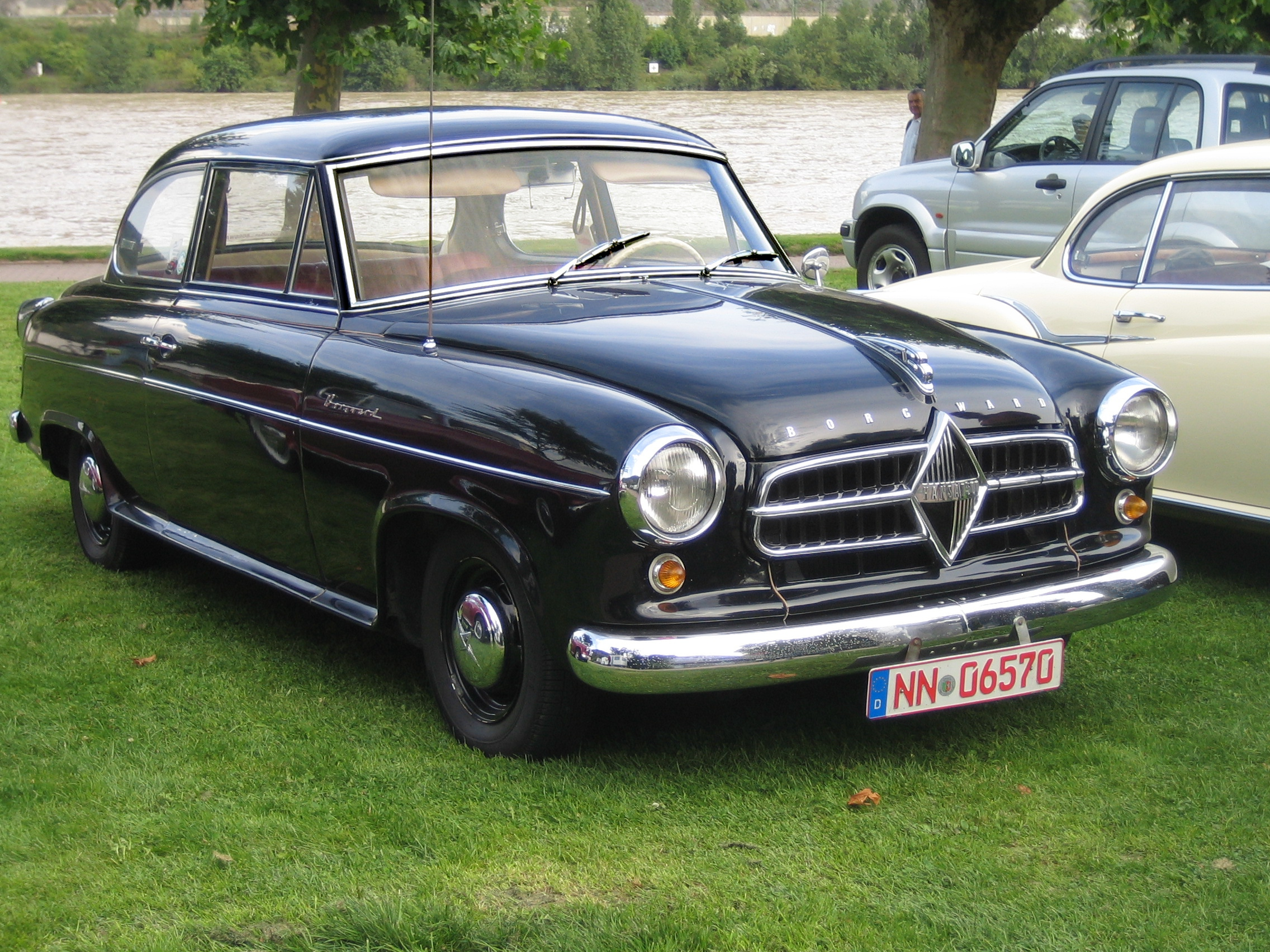 Borgward Hansa 1500 (Isabella), Bauzeit 1954 bis 1956 1957 wurde "Hansa 1500" im Rhombus durch den Schriftzug "Isabella" ersetzt.